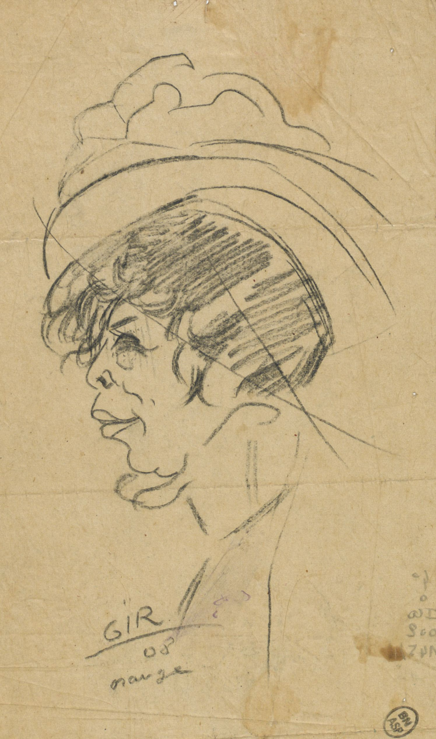 Aimée Tessandier répétant "Iphigénie" de Racine : dessin.